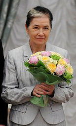 Галина Петровна Хованская